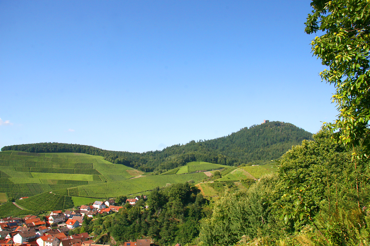 Rebland